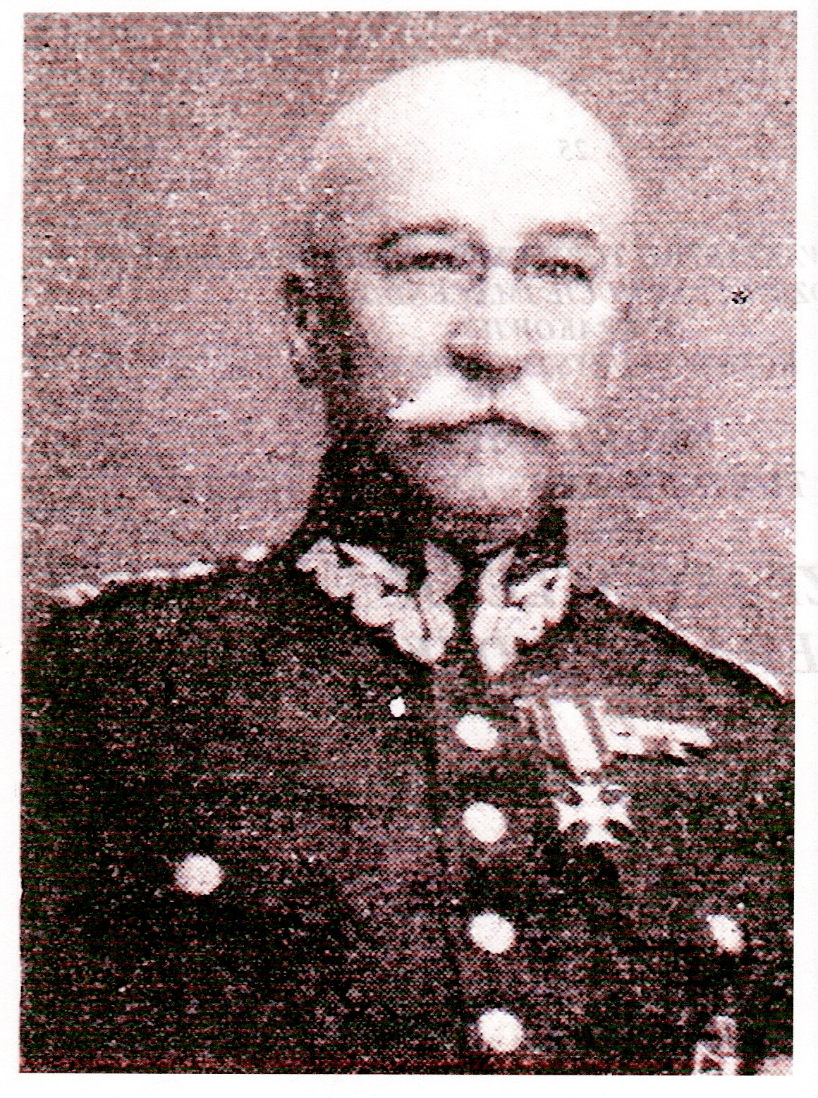 Generał Mikołaj Wisznicki